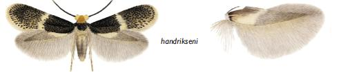 Ectoedemia hendrikseni male and male hindwing